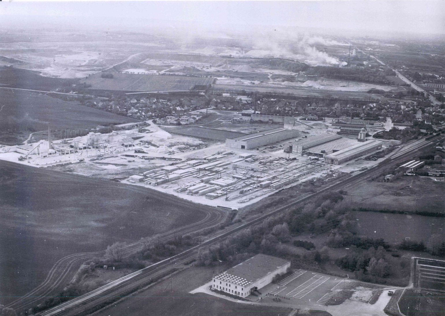 Luftfoto af Spændbeton omkring 1980